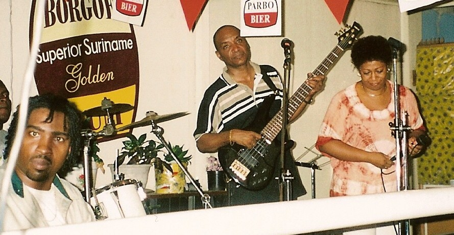 Denise Jannah in Paramaribo, November 2002. Eigen opname.